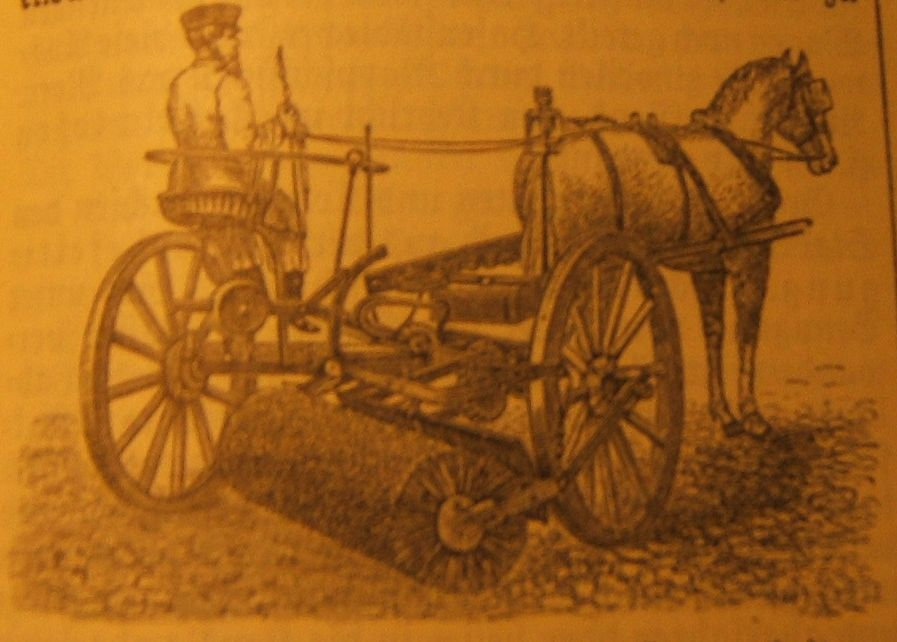 Straßenkehrmaschine 19. Jh.